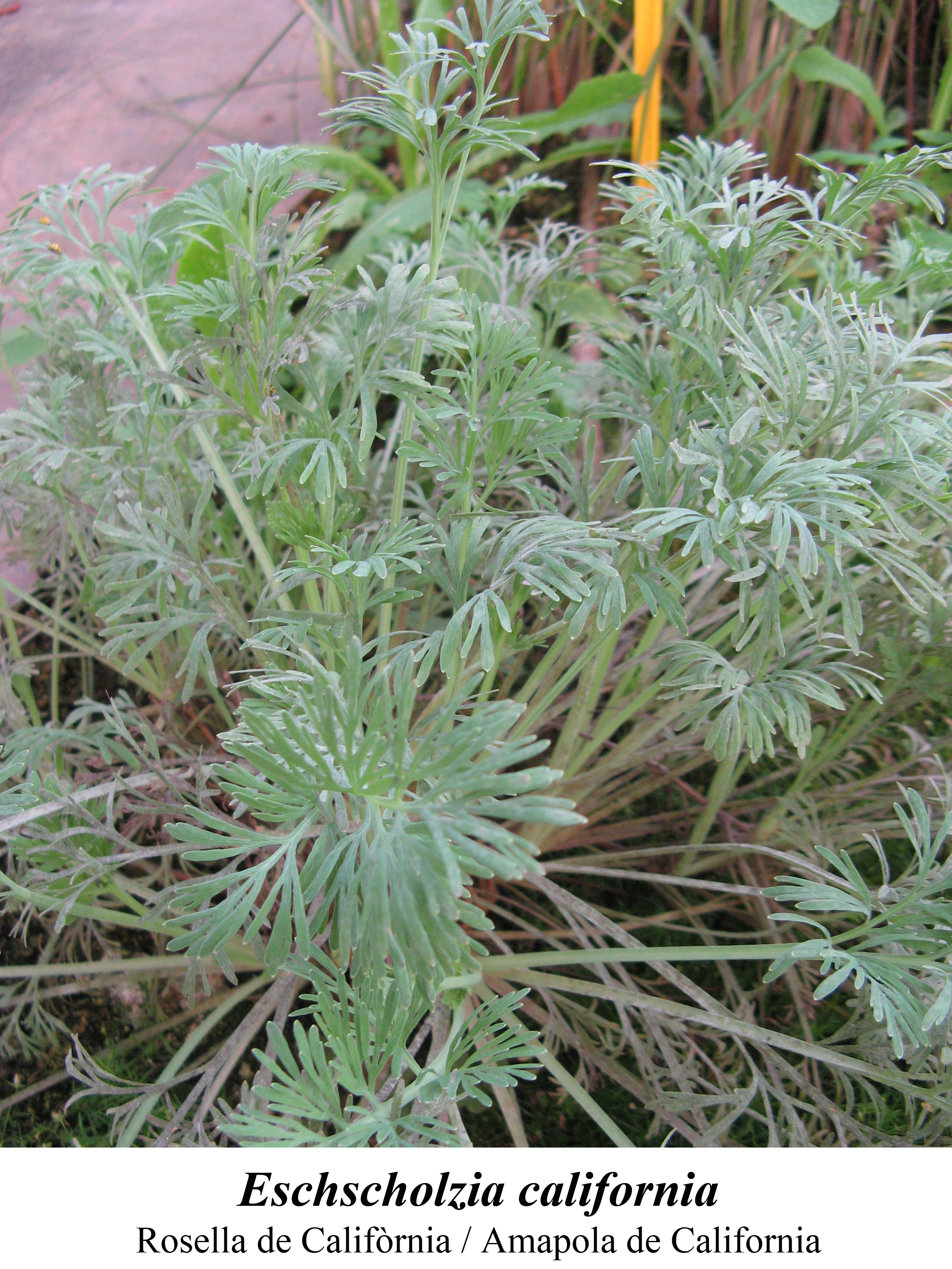 planta medicinal